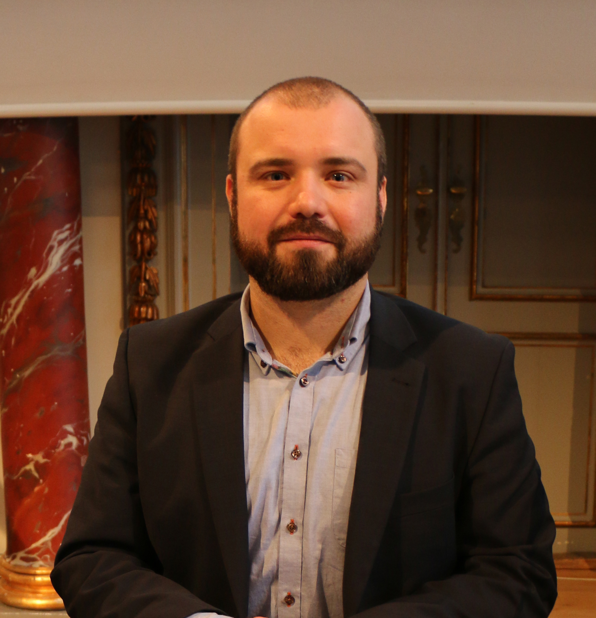 Nicolaj Villumsen, 2013